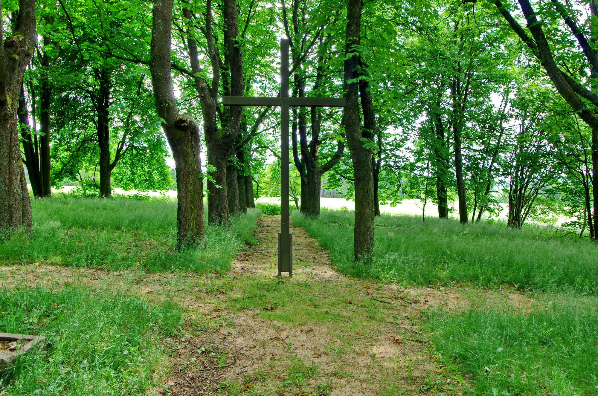 Zaniklá osada Újezd u česko-německé hranice u Aše, kříž na zaniklém hřbitovu, okres Cheb, okres Cheb